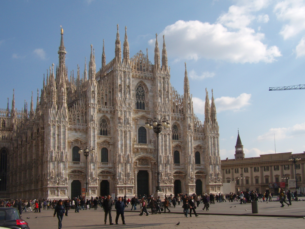 vista di Piazza del Duomo a Milano